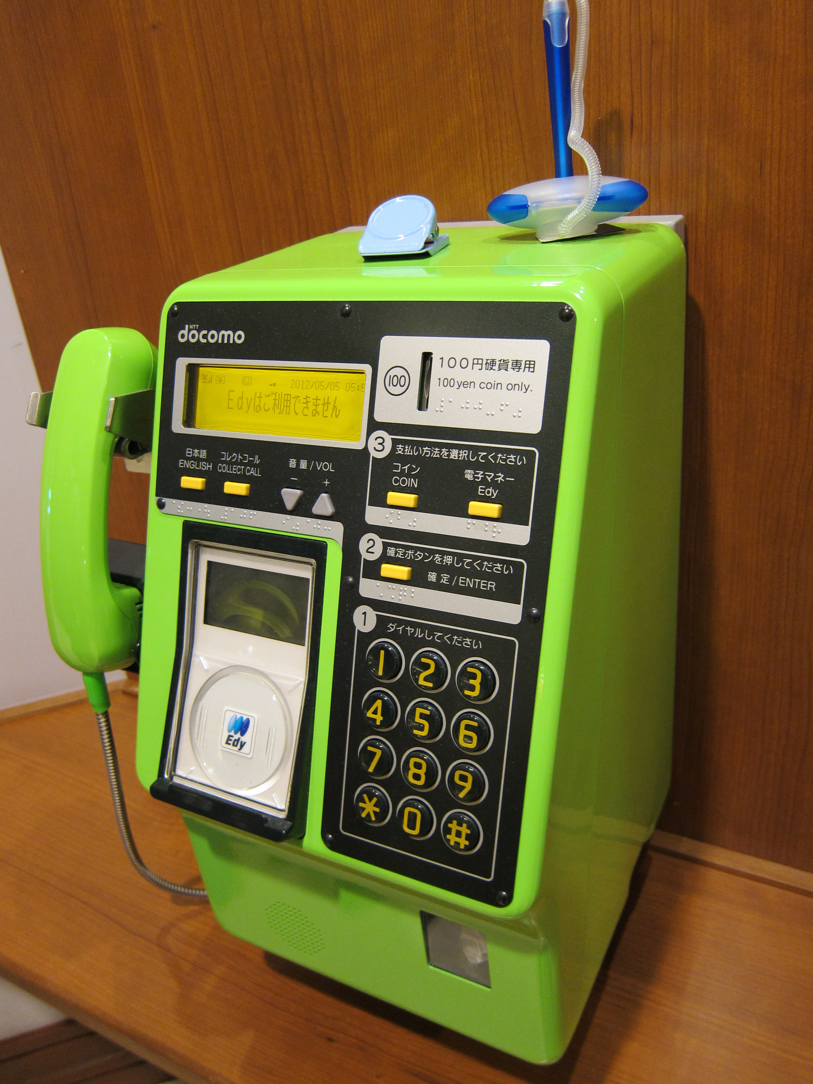 docomo提供の公衆電話。内海だからこれでよい、ということだろうか。